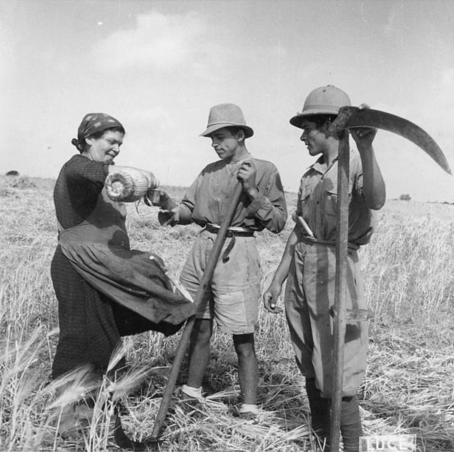 Afrika Settentrionale: La violenta battalgia della Marmarica non ha arrestato l'inizio della mietitura del grano. Soldati italiani affiancono i coloni in tale lavorno.